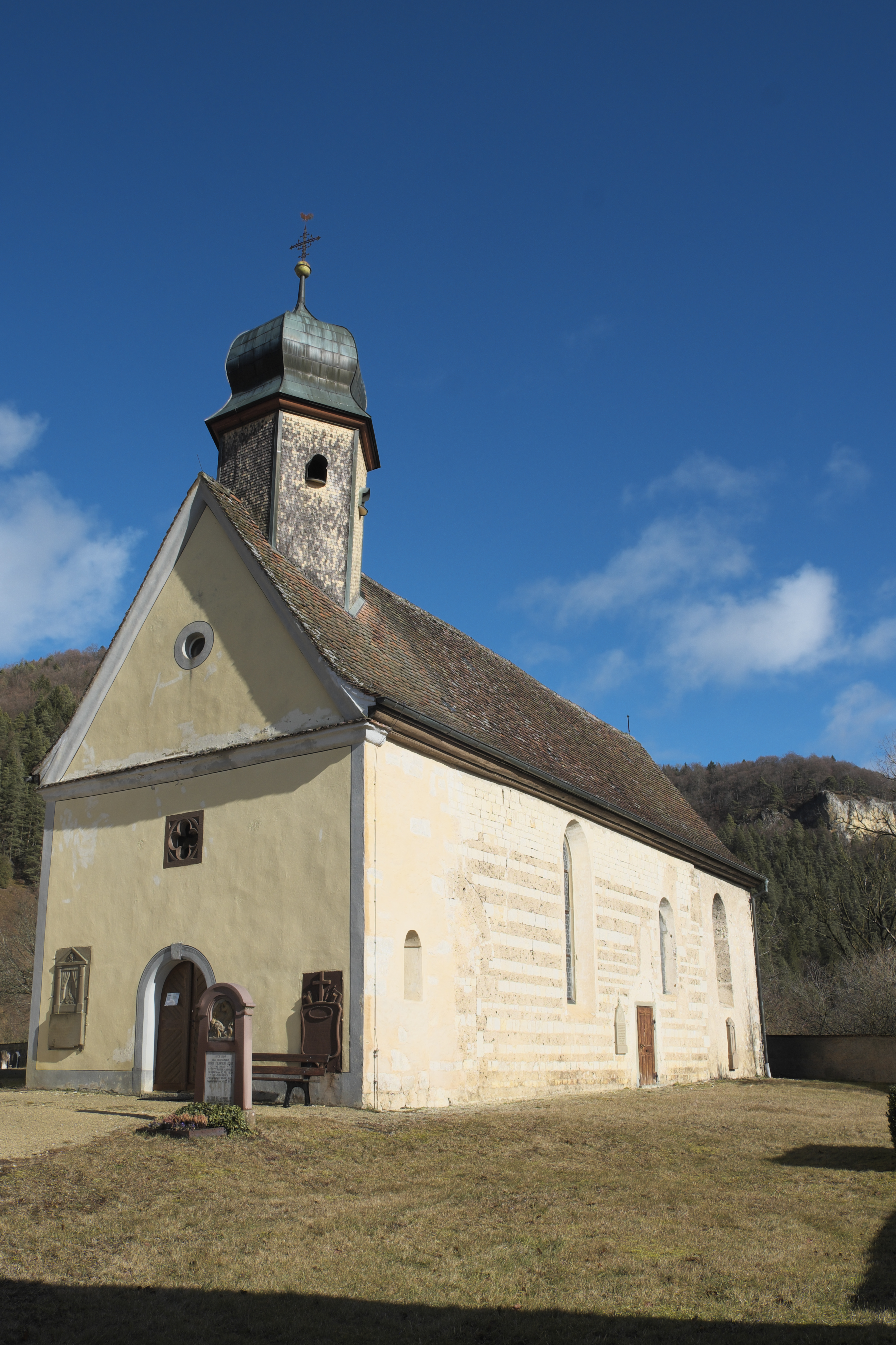 Friedhofskirche, ehemalige Pfarrkirche, St. Gallus in Mühlheim an der Donau im Landkreis Tuttlingen (Baden-Württemberg/Deutschland)